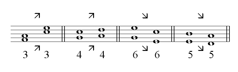 Description : Mouvement parallèle Source : Personnelle Licence : GFDL